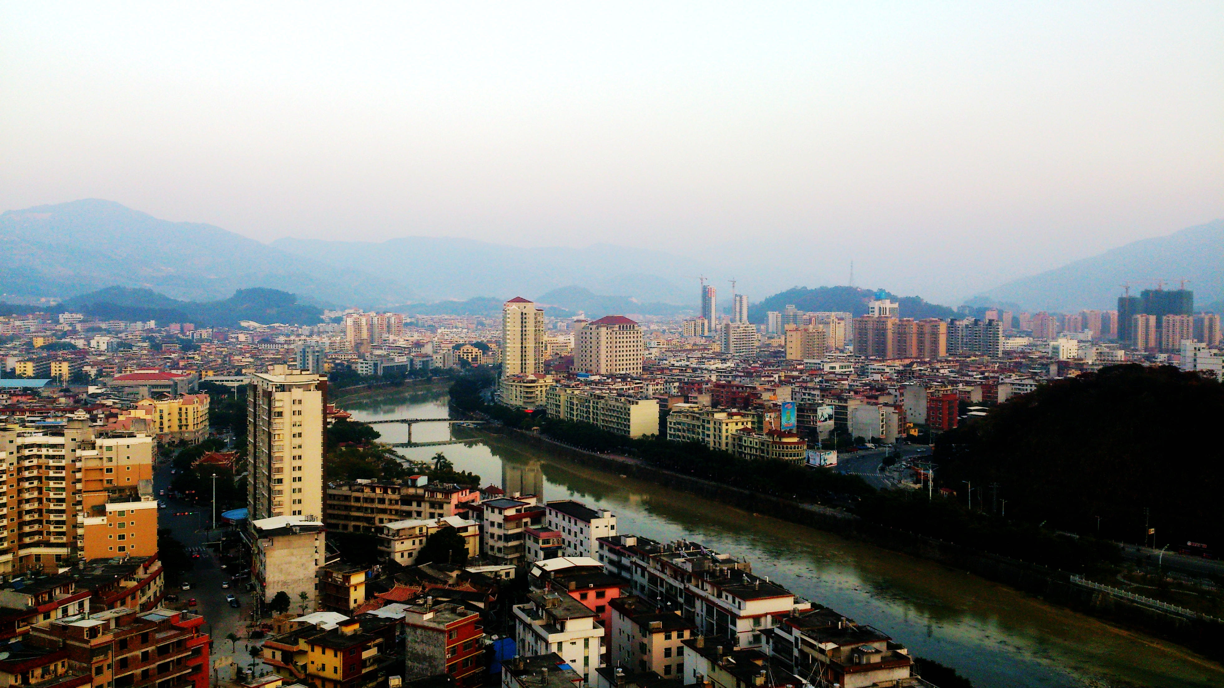 永春城关